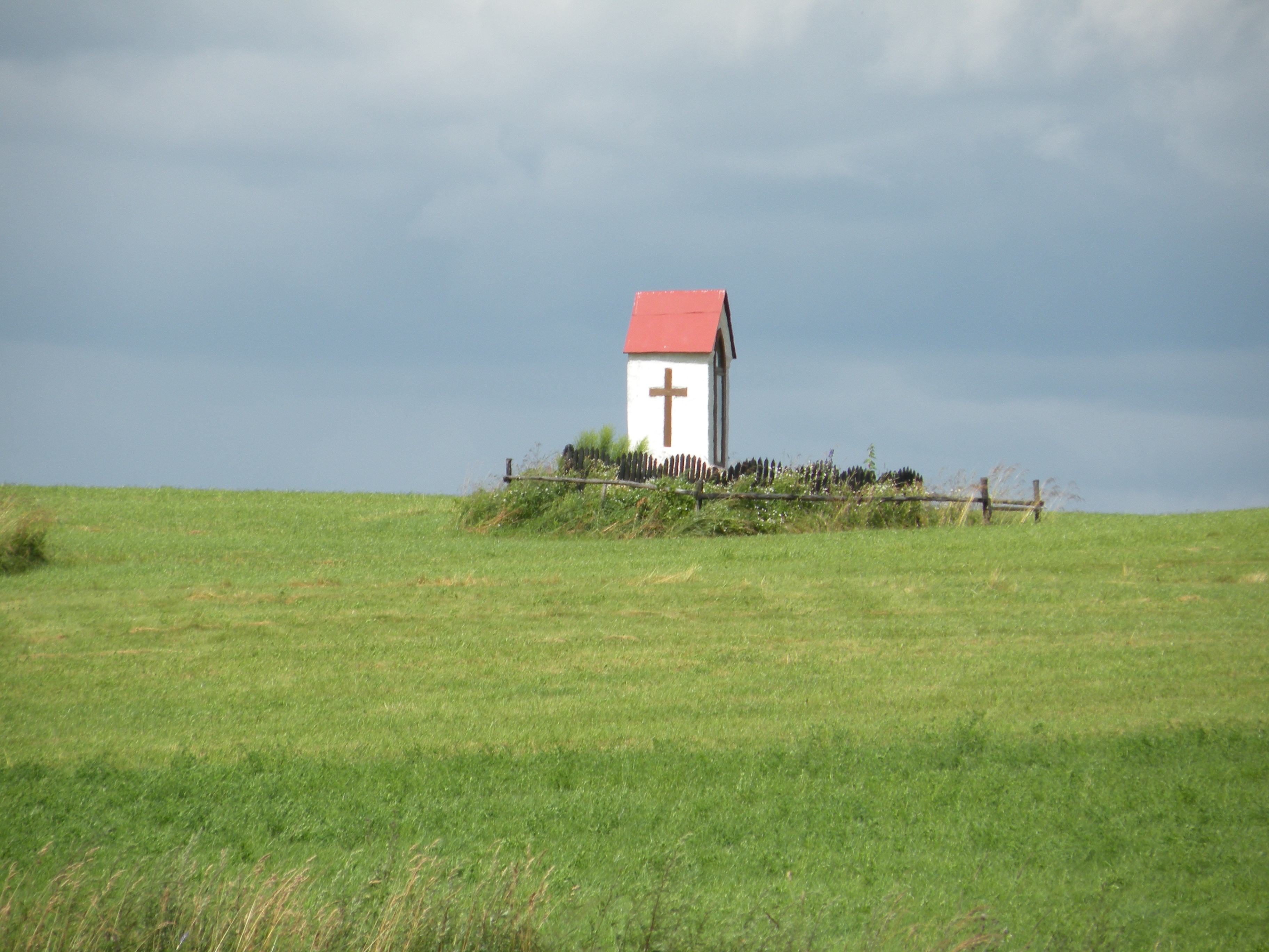 Kapliczka śródpolna, na wschód od wsi, między siedliskami